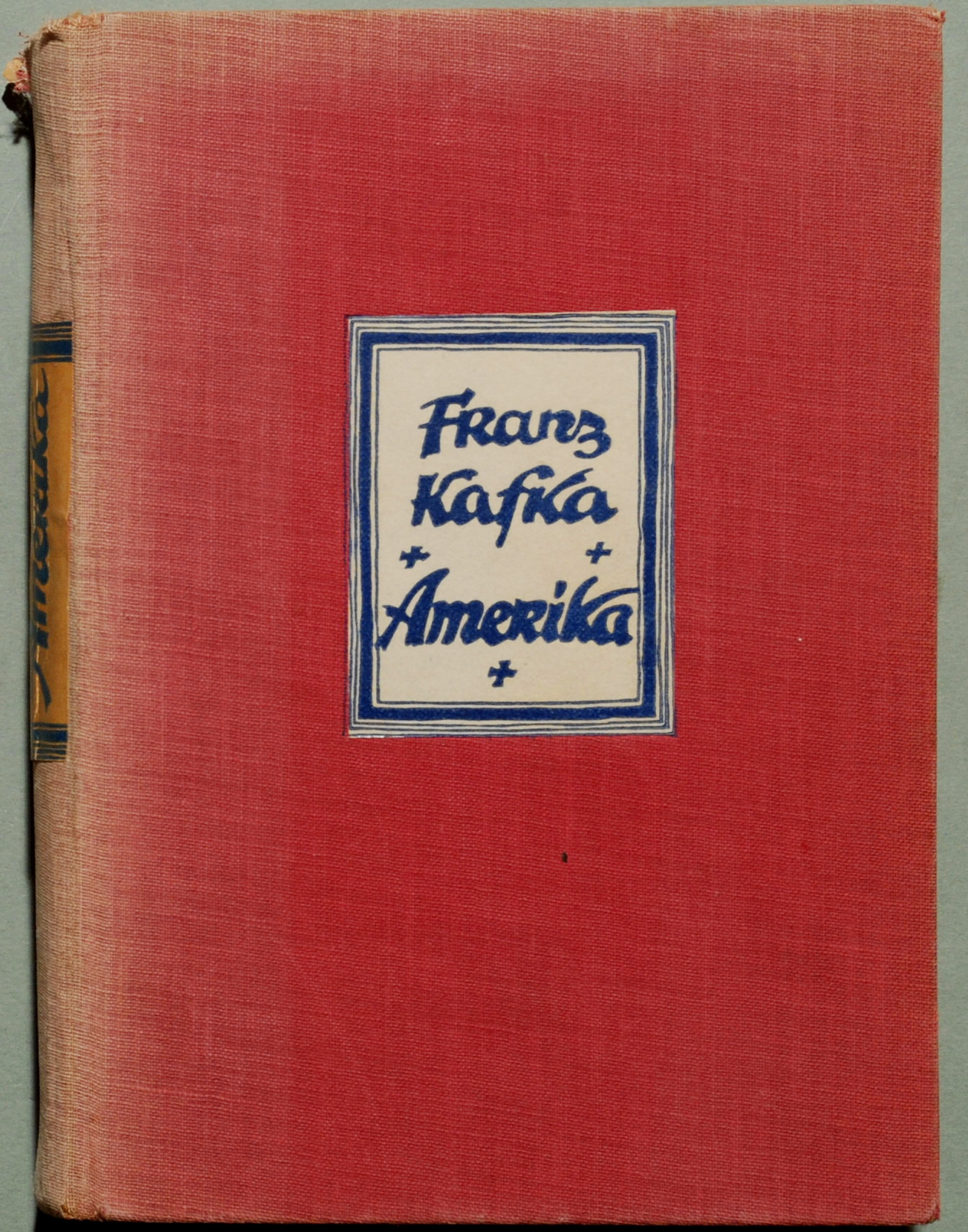 Kafka, Franz: Amerika. Roman. München: K. Wolff 1927, 392 Seiten. Erstausgabe (Wilpert/Gühring² 10)